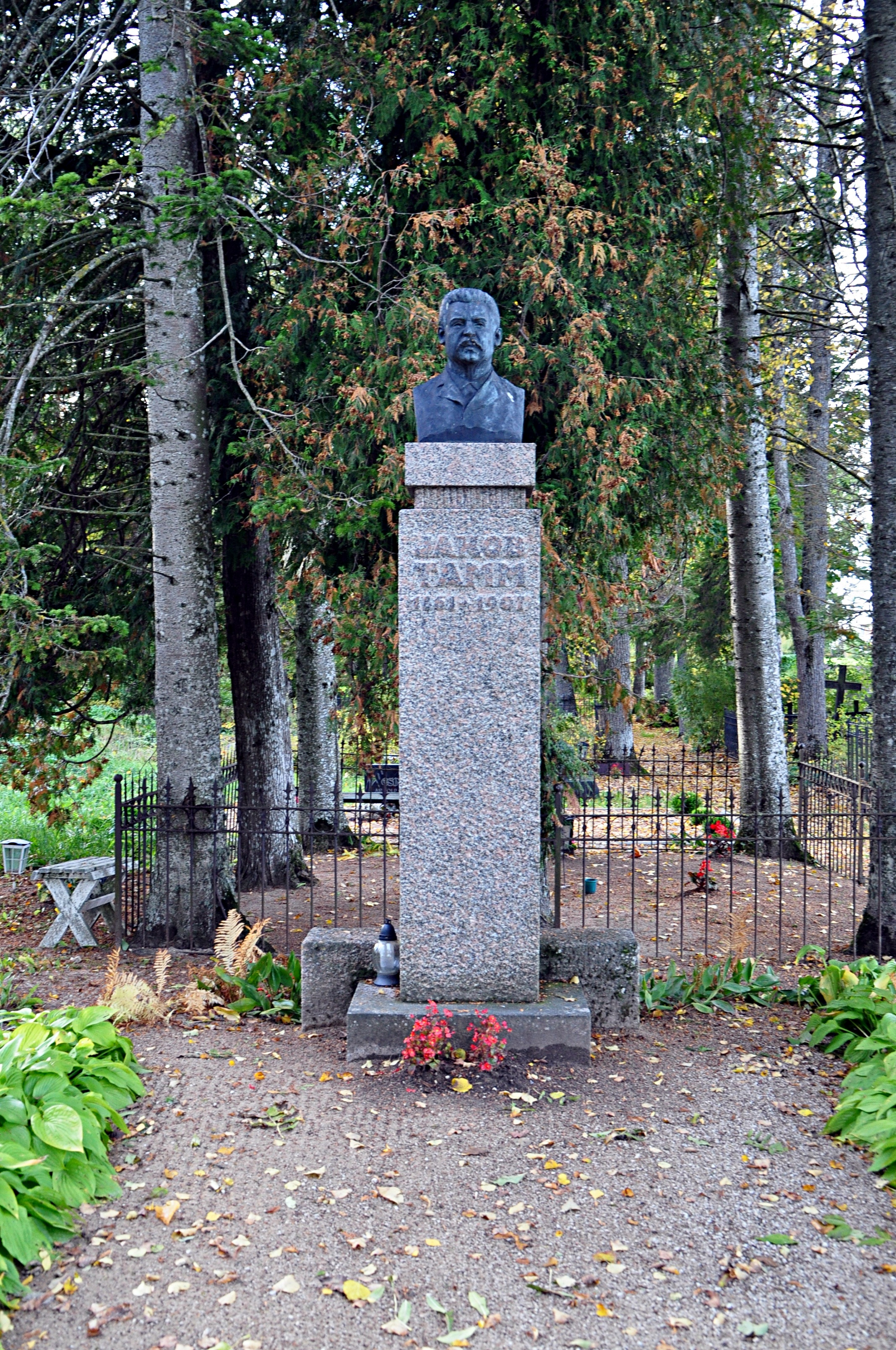 Jakob Tamme haud (1861-1907) Väike-Maarja surnuaias